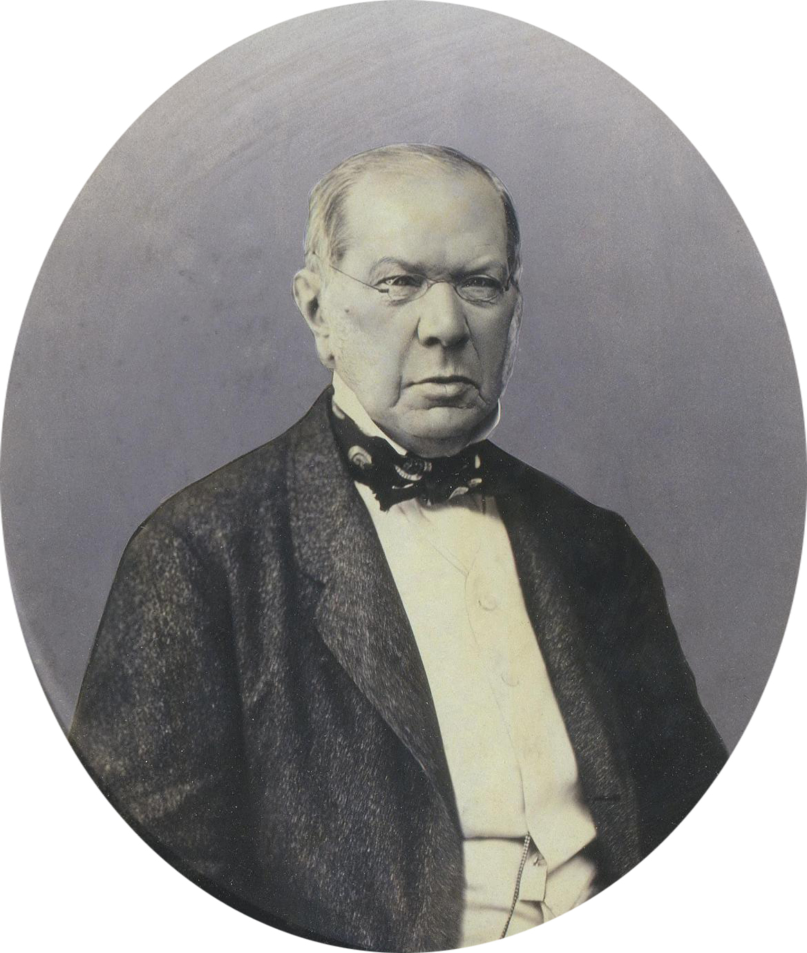 Вяземский, Пётр Андреевич